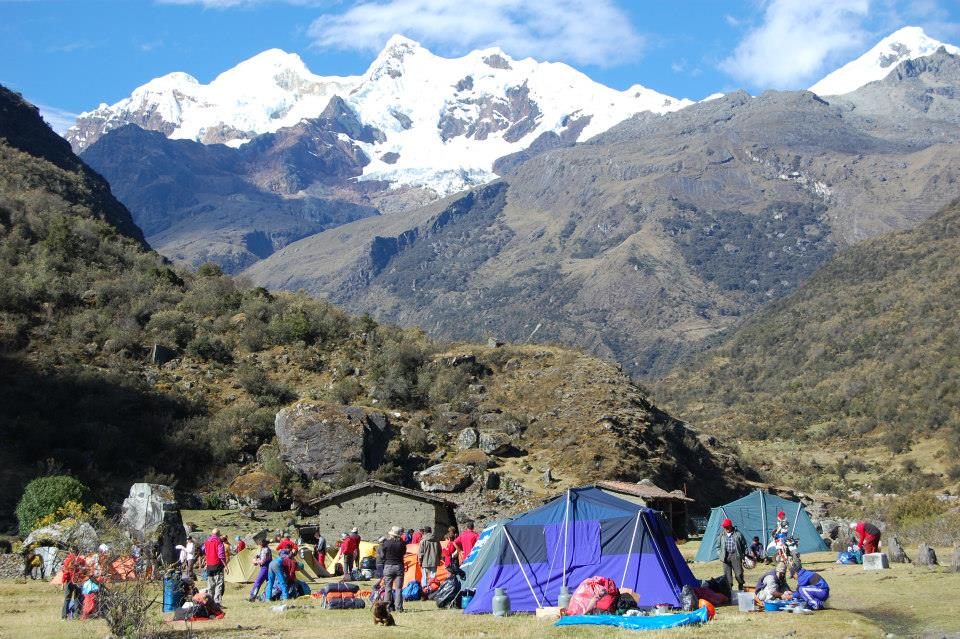 Bayoraju